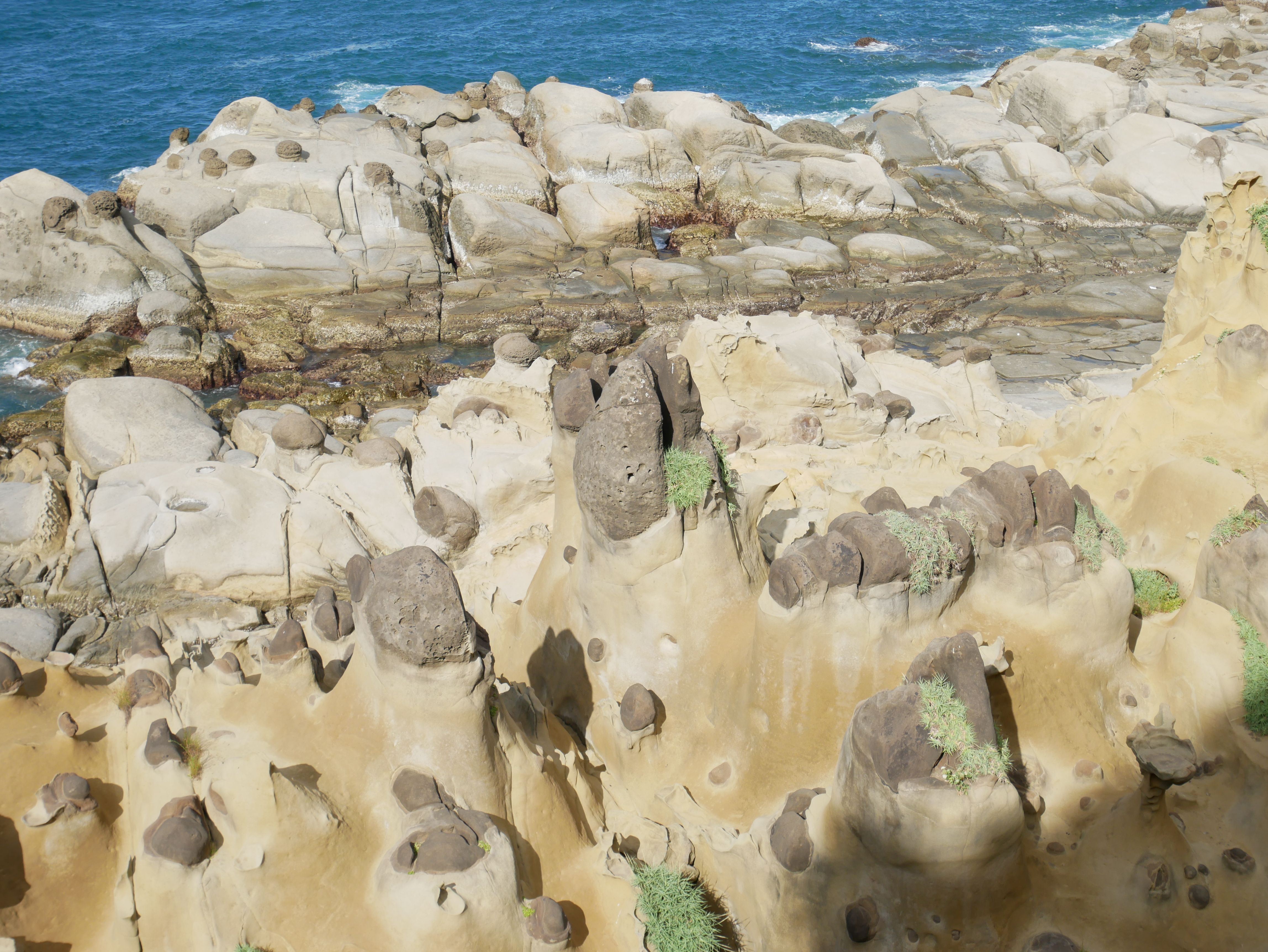 和平島公園豬腳岩，基隆市中正區平寮里